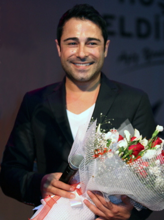 Atilla Taş